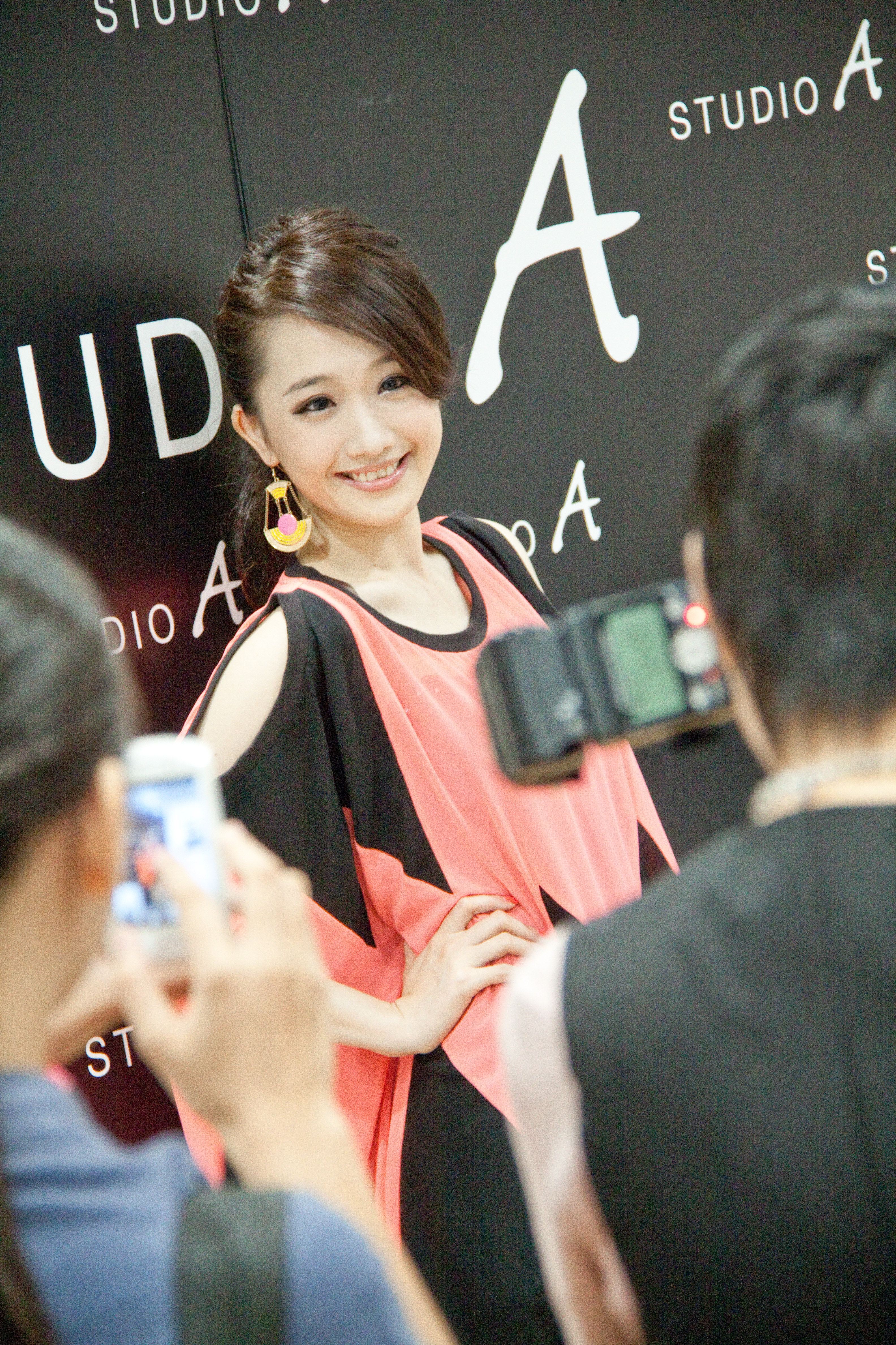 晶實科技在微風廣場舉辦Studio A微風門市開幕宣傳活動，朱俐靜擔任一日店長。